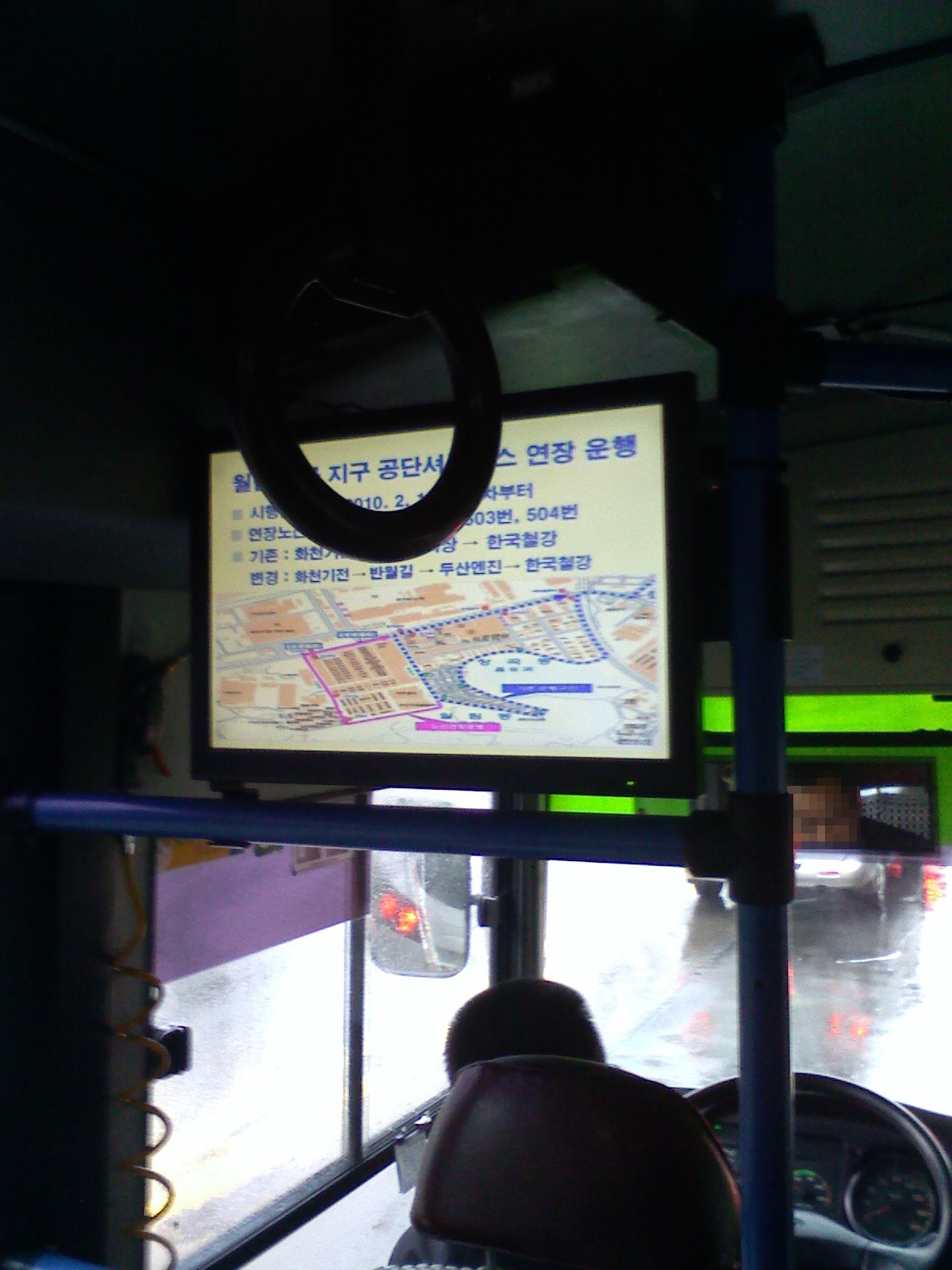 창원소속 버스회사 차량 내부에 있는 LCD광고, 자작